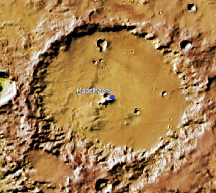 Cráter marciano Magelhaens. (Imagen IAU/USGS/Goddard/A SU/USGS)